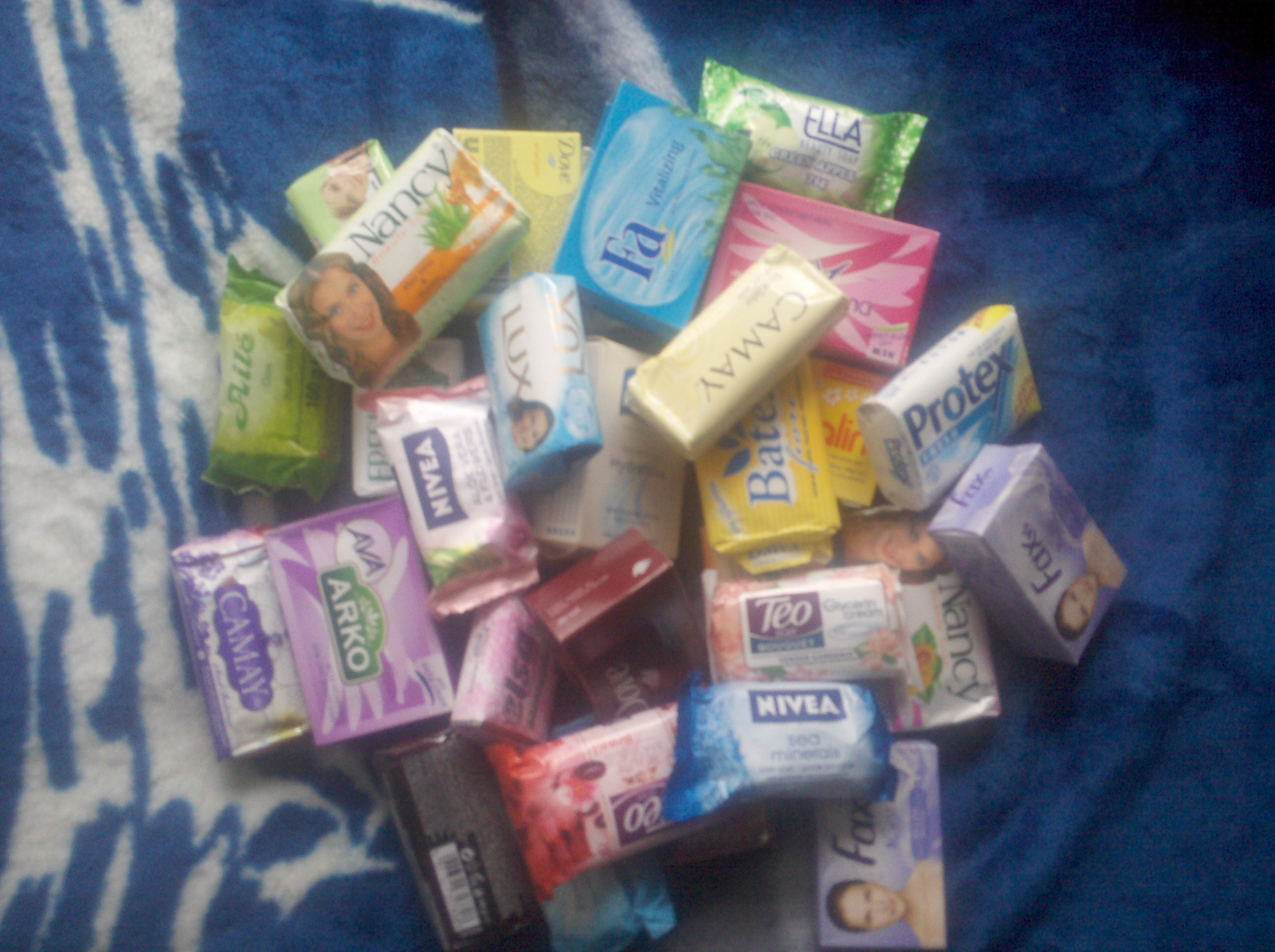 savones